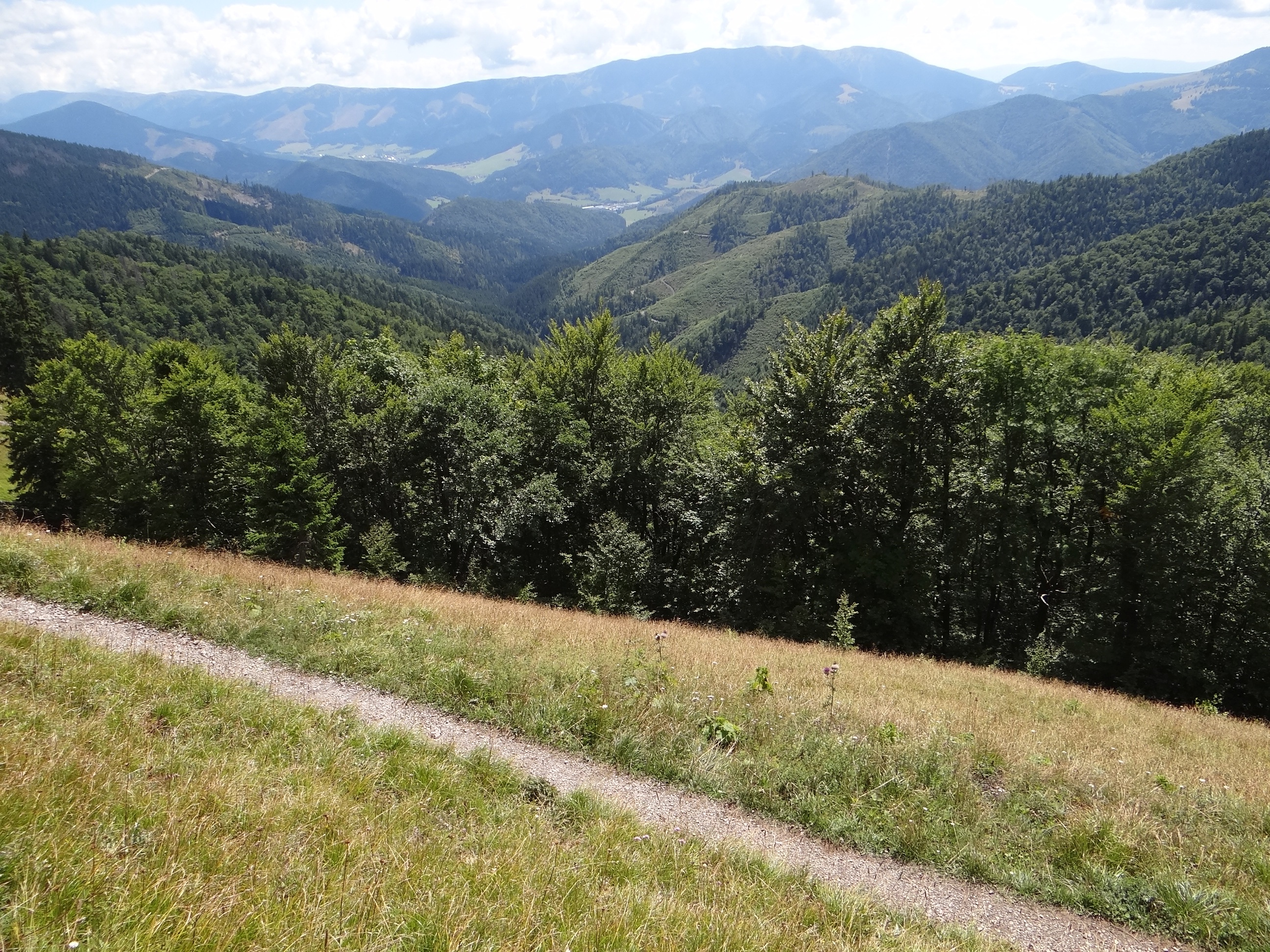 Skalné. Widok z grzbietu Skalná Alpa - Tanečnica